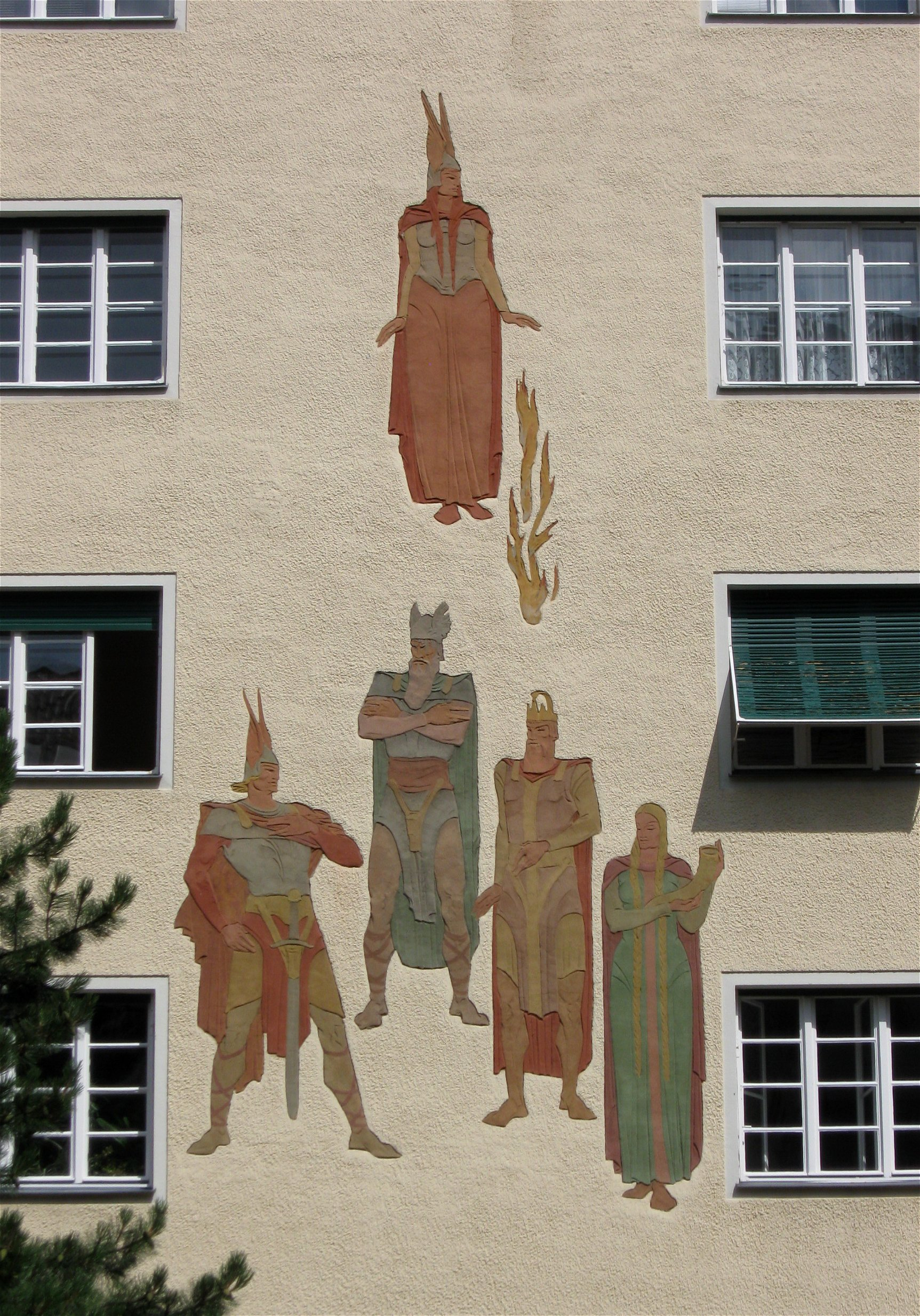 Nibelungenstraße 14; Wohnanlage mit einbezogenem und erhöhtem Mittelteil, sowie rückspringendem Westabschluß, 1928 von Gustav Ludwig; am Mittelbau (Nr. 14) Kratzputzgemälde von Bruno Goldschmitt (Nibelungen).